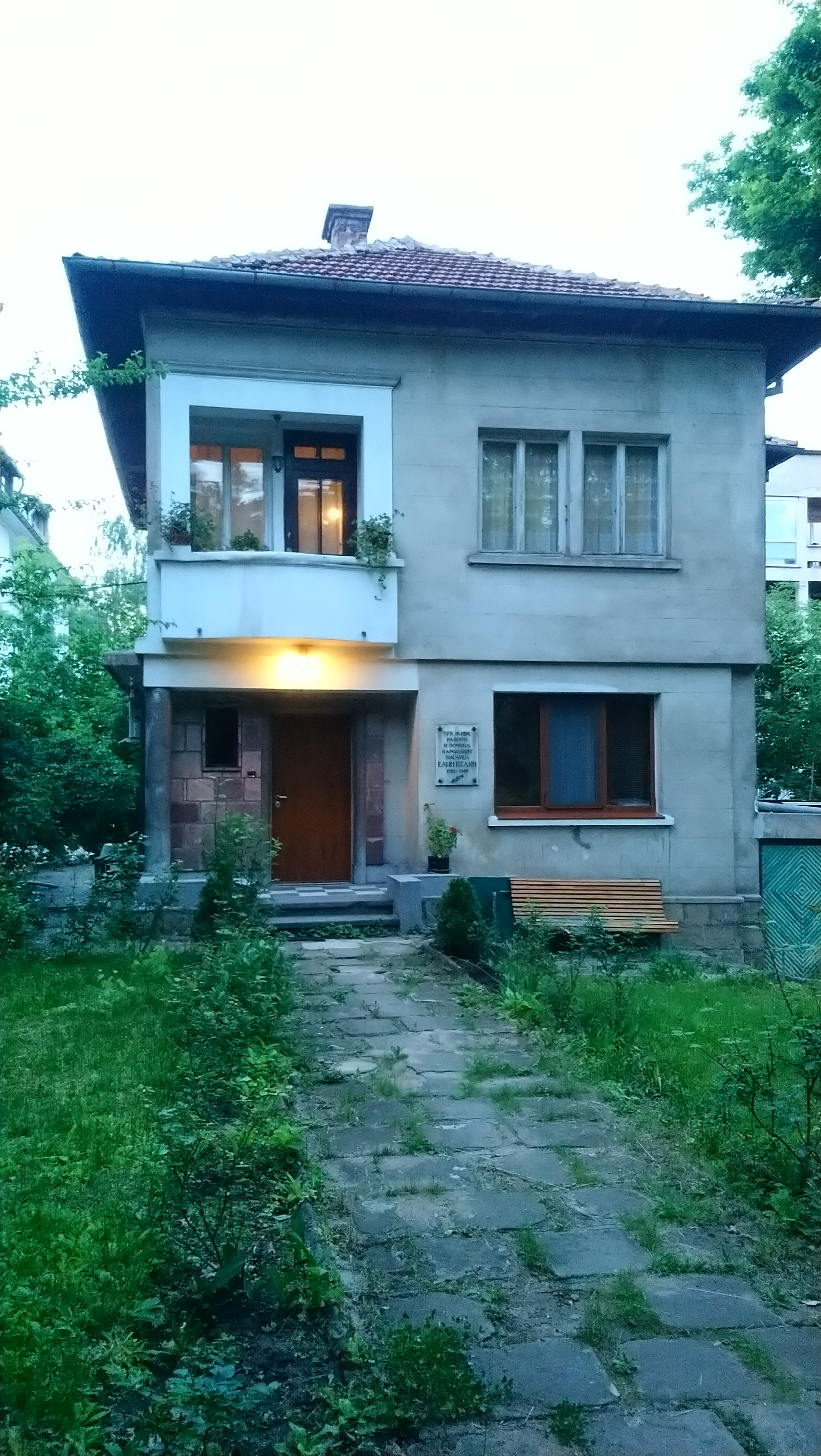 Домът на писателя Елин Пелин, Лозенец, София, на ул. Елин Пелин 12